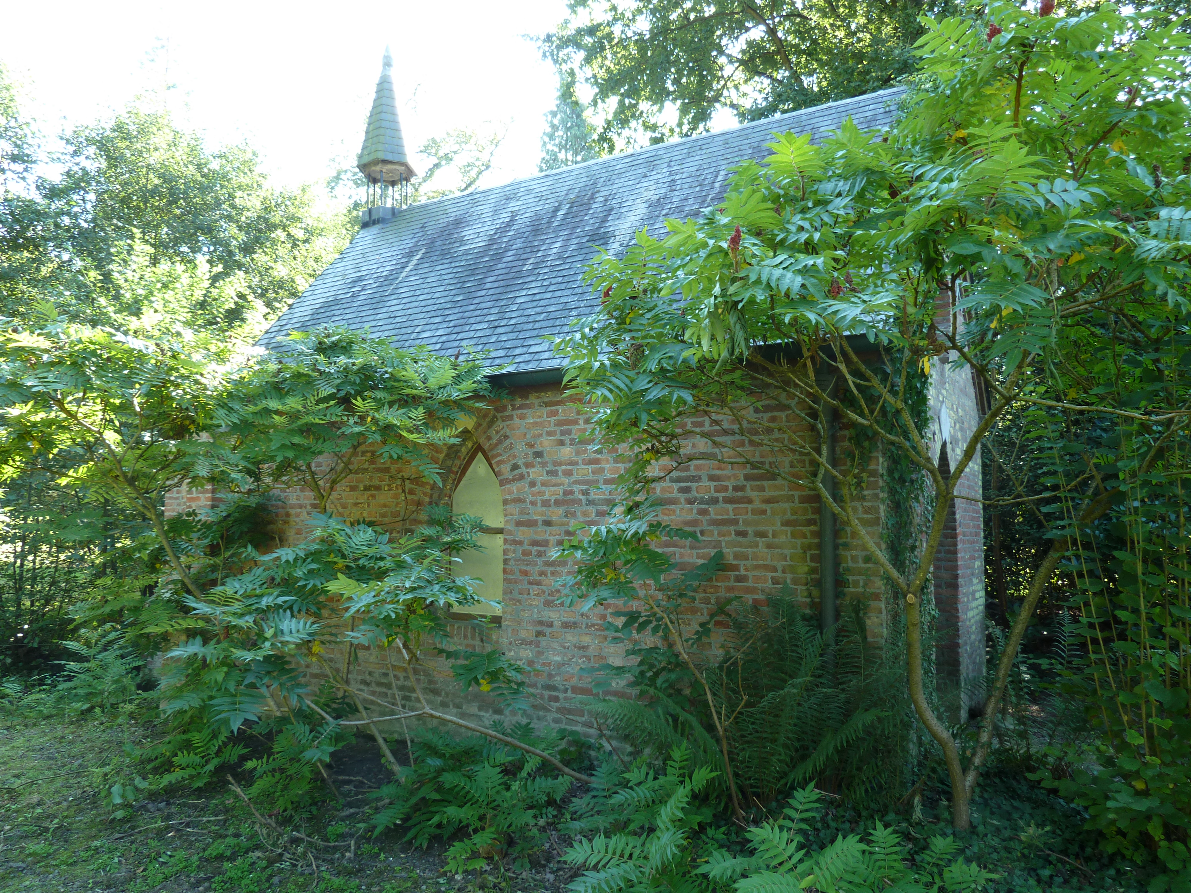 Mariakapel bij Kasteel Neubourg, Gulpen, Nederland